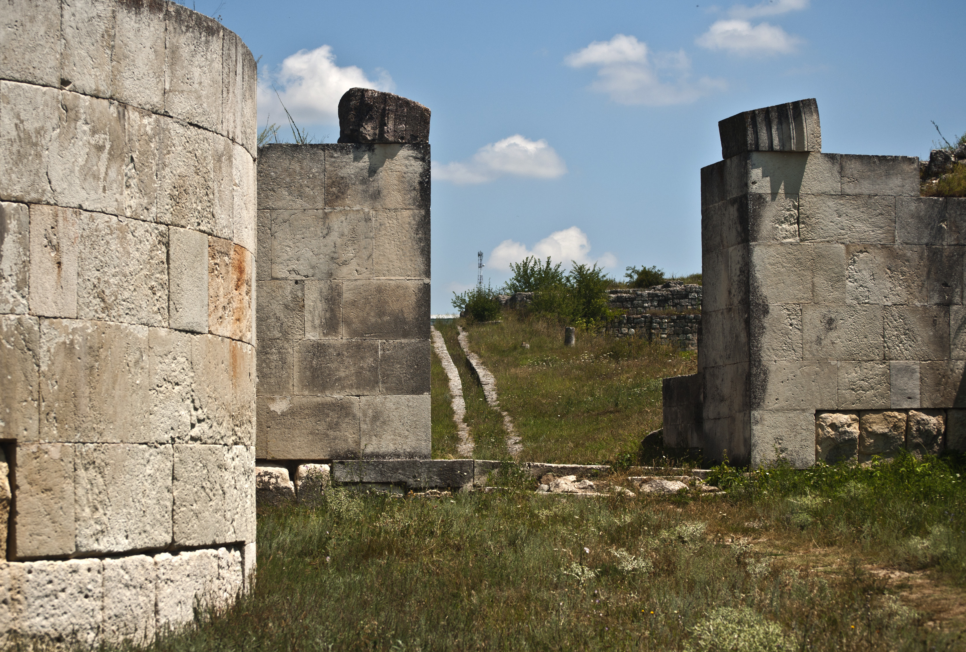 Cetatea Adamclisi este considerata drept cea mai mare asezare civila romana de pe teritoriul Dobrogei, construita in acelasi timp cu Monumentul comemorativ. 01